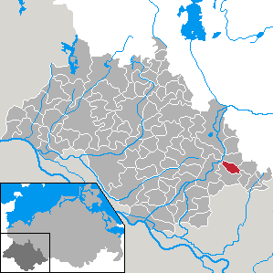 Zierzow in Mecklenburg-Vorpommern - district Ludwigslust